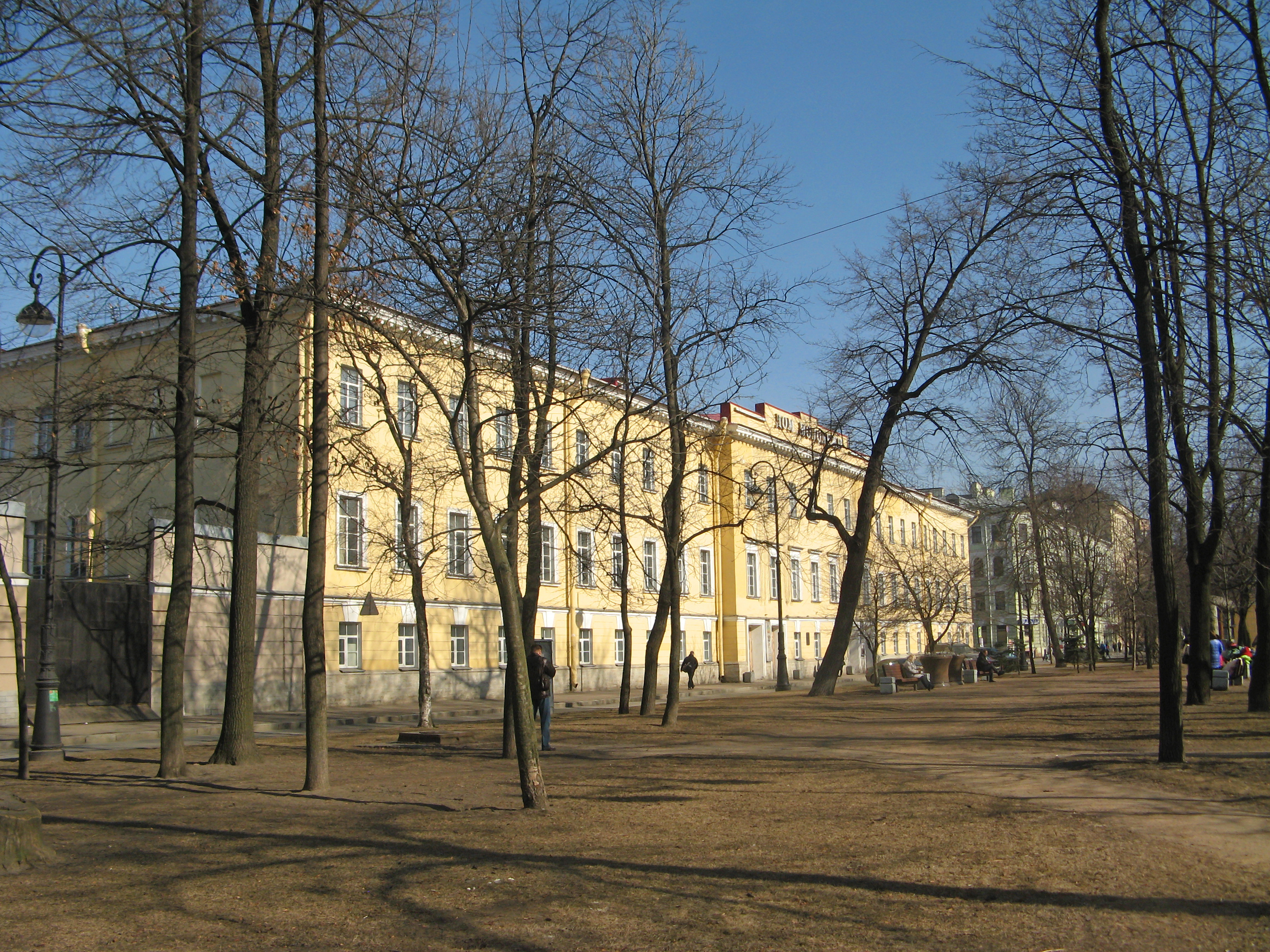 Госпиталь Финляндского полка: Большой проспект Васильевского острова, 65, Василеостровский район, Санкт-Петербург